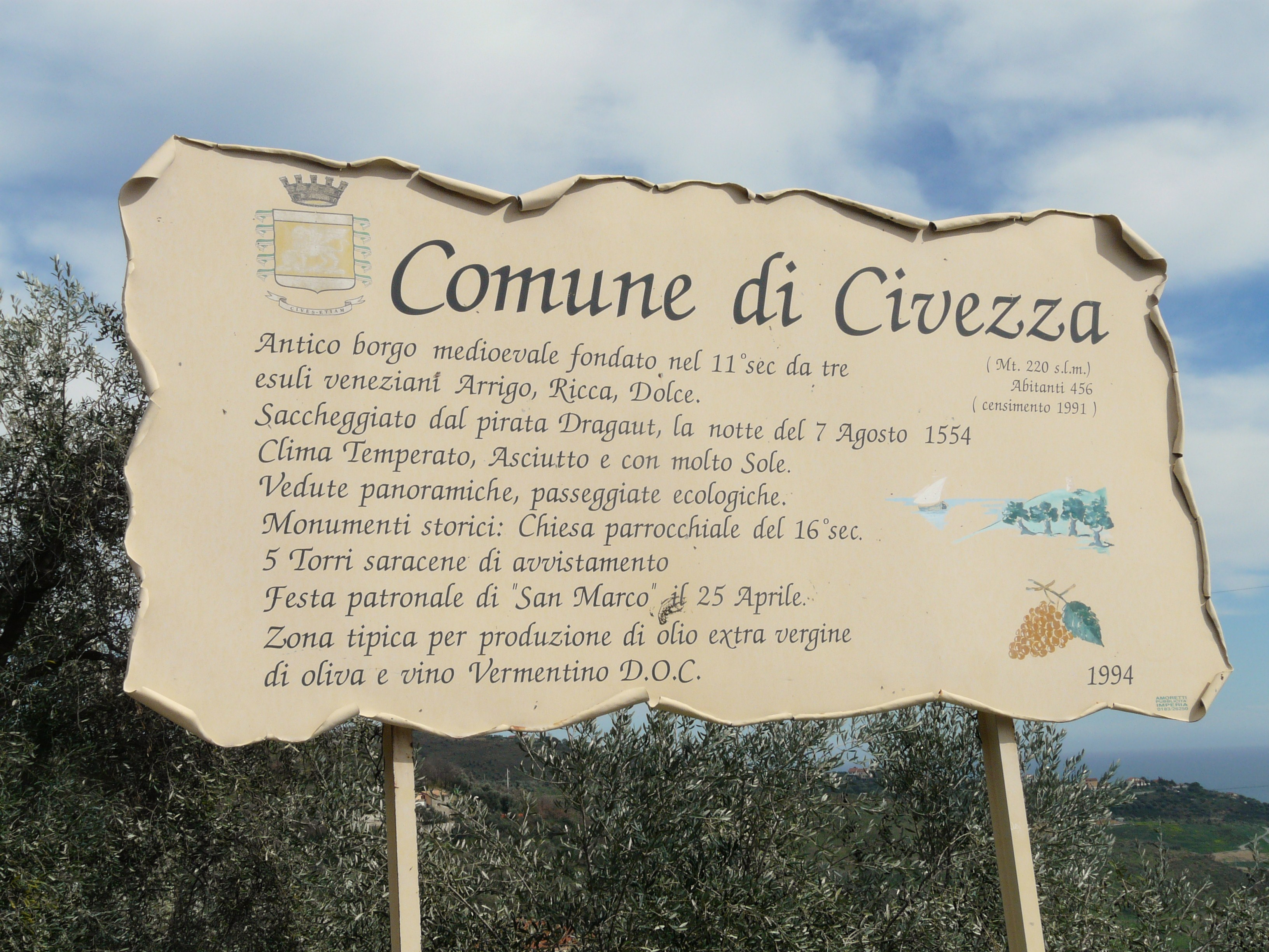 Civezza, Liguria, Italia